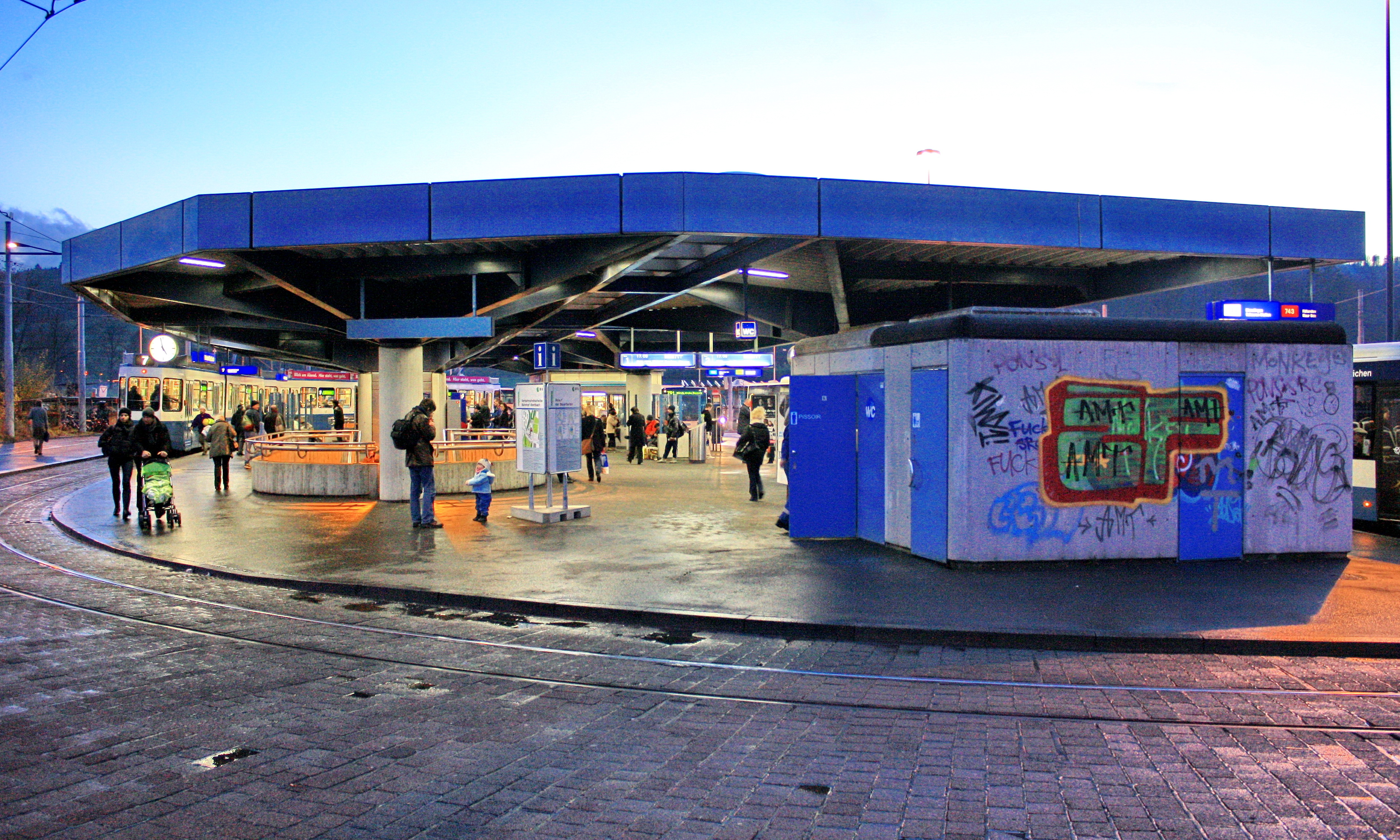 Bahnhof Stettbach in Zürich-Stettbach (Switzerland)